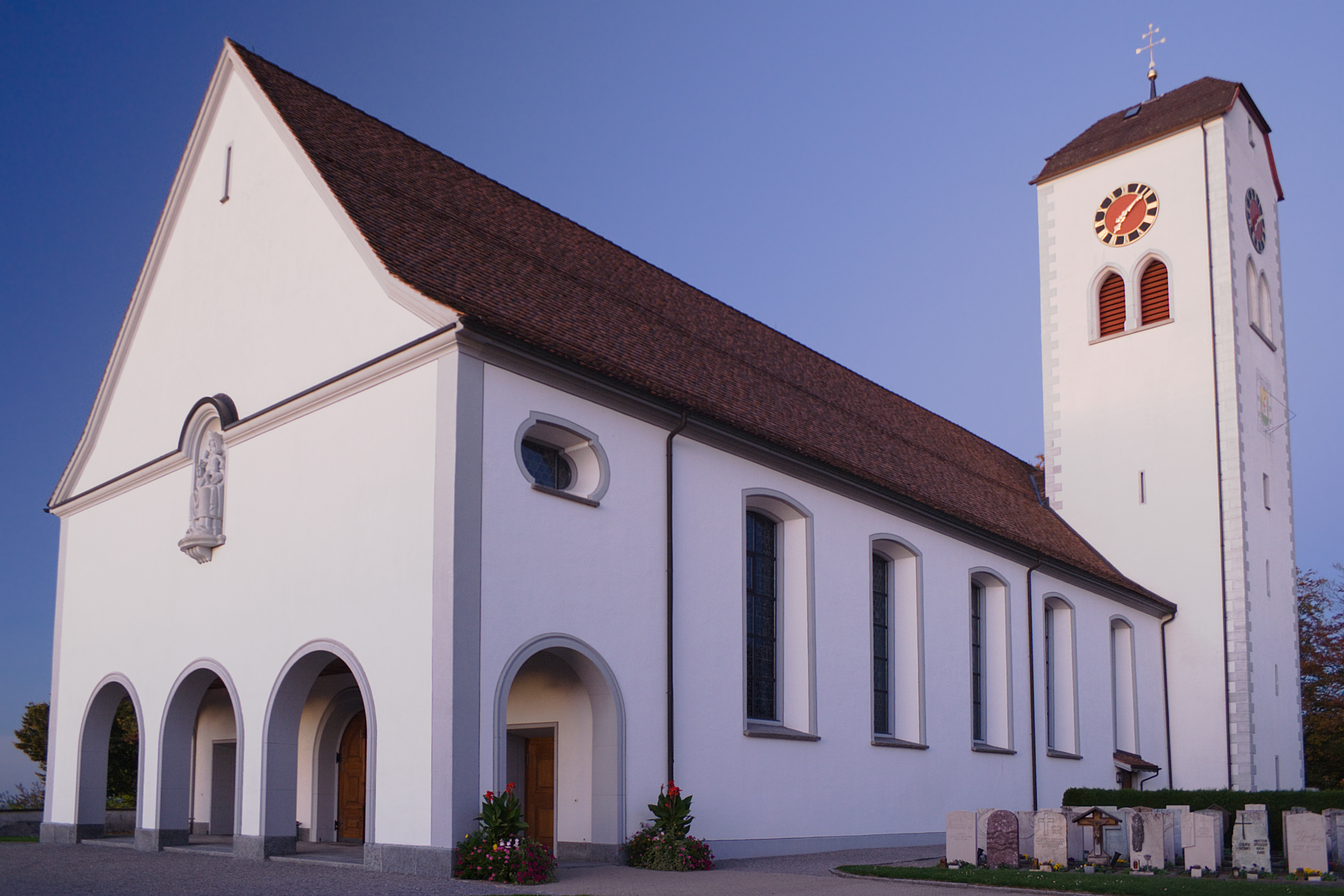 Das Wahrzeichen von Waldkirch (SG), Schweiz: Die katholische Kirche St. Blasius